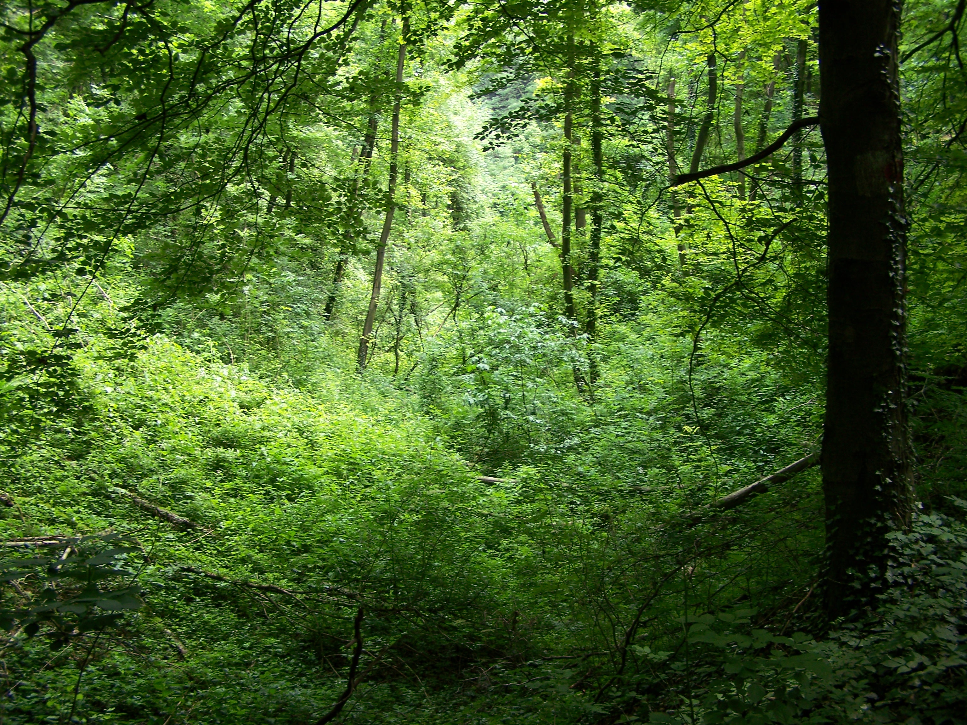 Alter zugewachsener Erztagebau im Hüggel in der Nähe des Silbersees